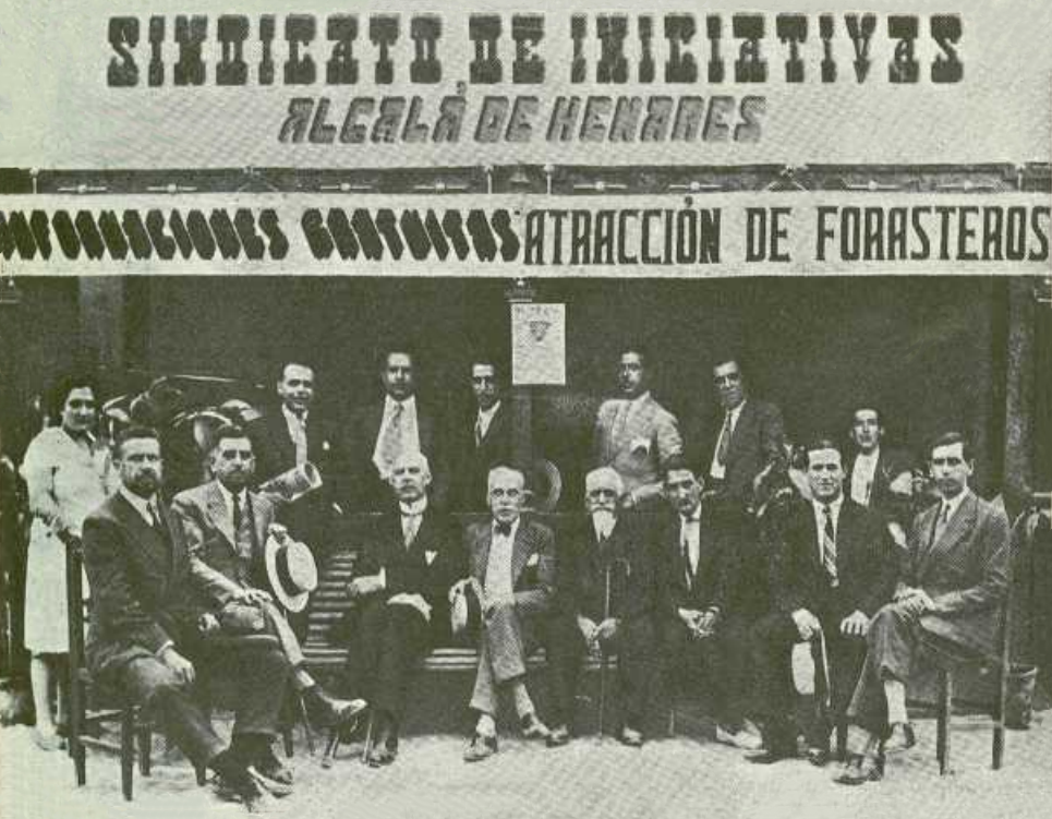 Sindicato de Iniciativas Turísticas y Atracción de Forasteros de Alcalá de Henares (Comunidad de Madrid - España) en agosto de 1930, presidido por Francisco Huerta Calopa.